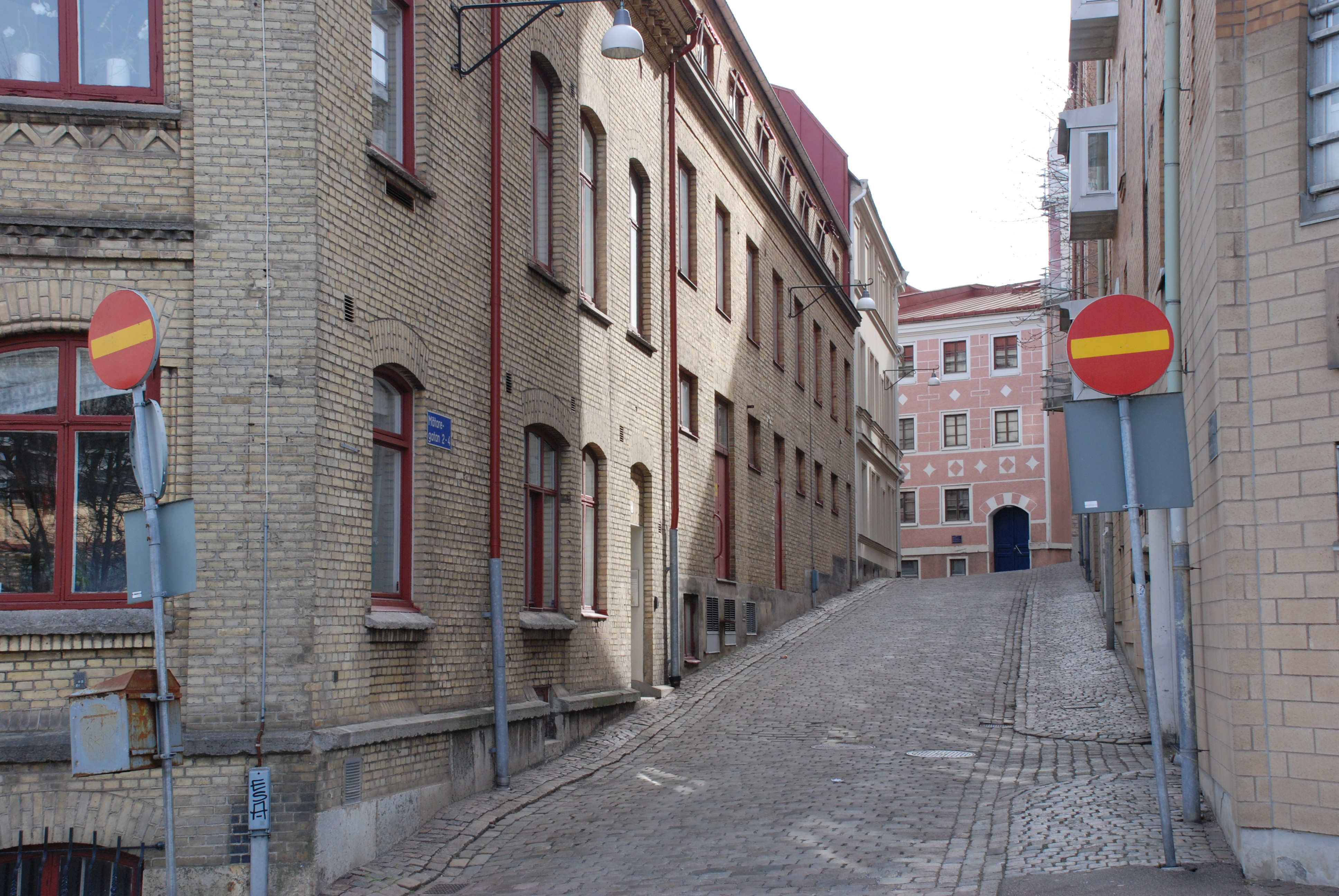 Mätaregatan på Kvarnberget i Göteborg. Sedd i riktning från Sankt Eriksgatan mot Kvarnbergsgatan.